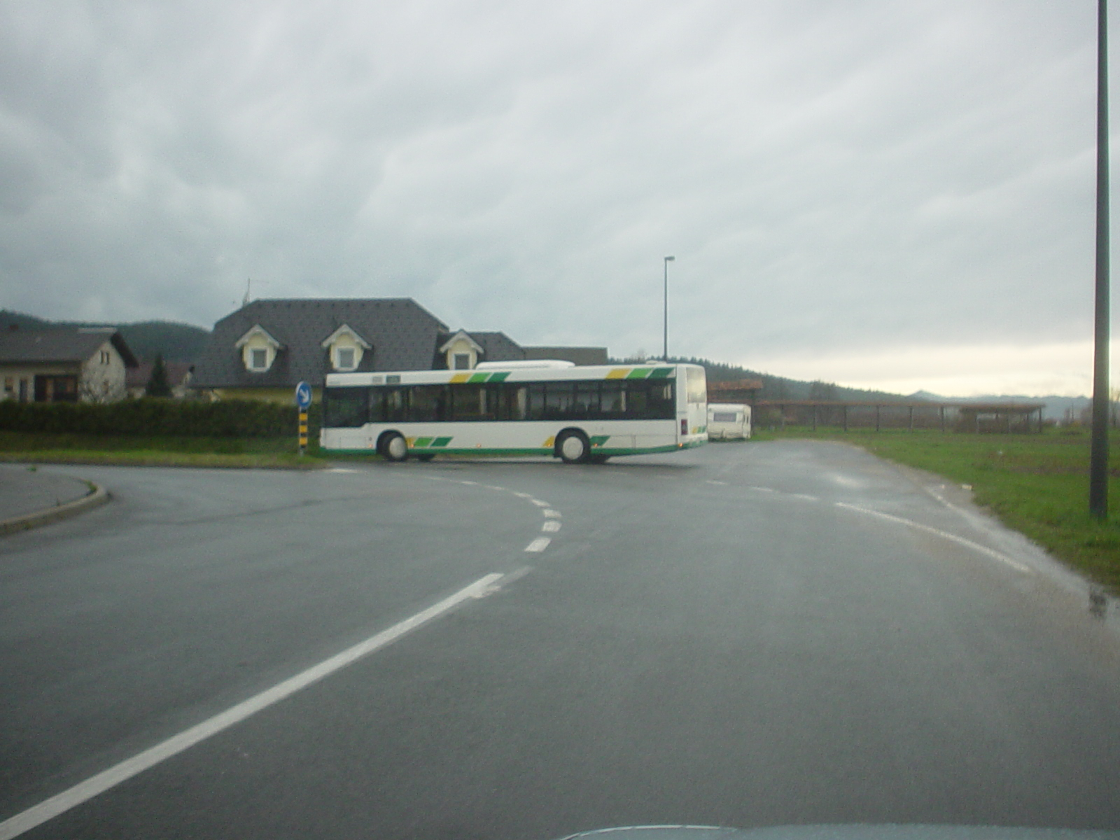 Mestni avtobus v Bizoviku.